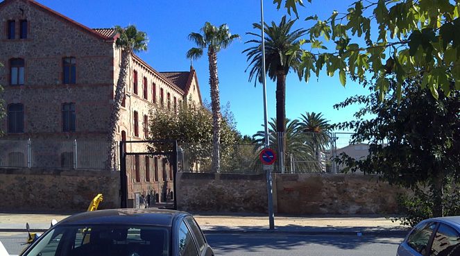 Colegio la Salle - Premia de Mar